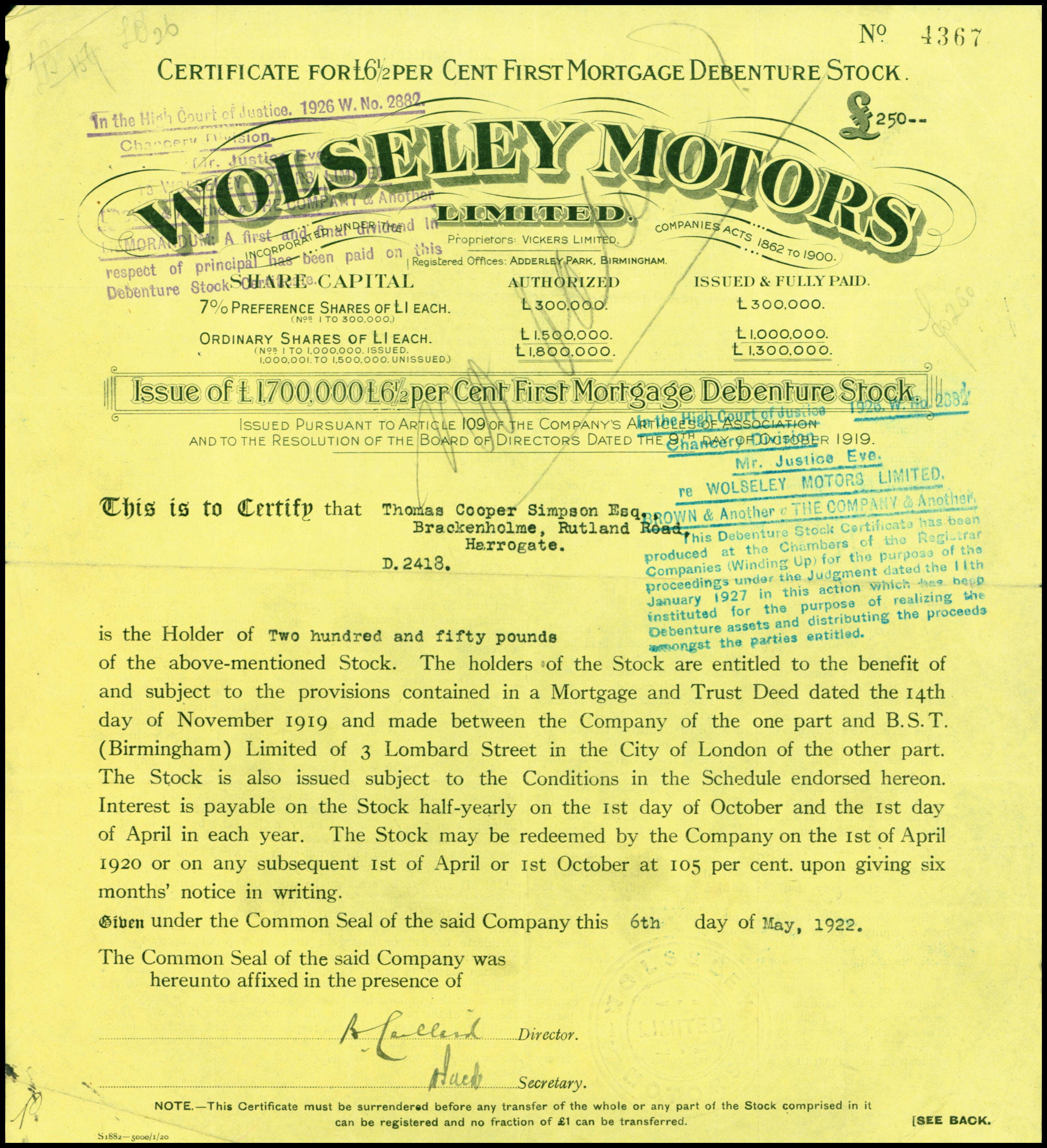 Schuldverschreibung der Wolseley Motors Ltd vom 6. Mai 1922